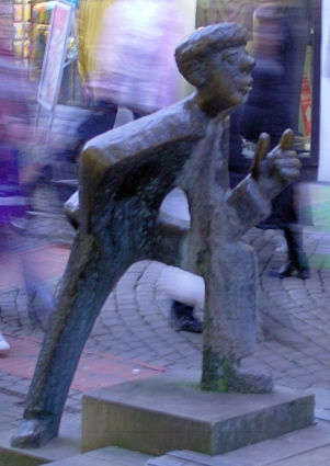 Das Denkmal Weserspucker in Minden (Westf.), Nordrhein-Westfalen.